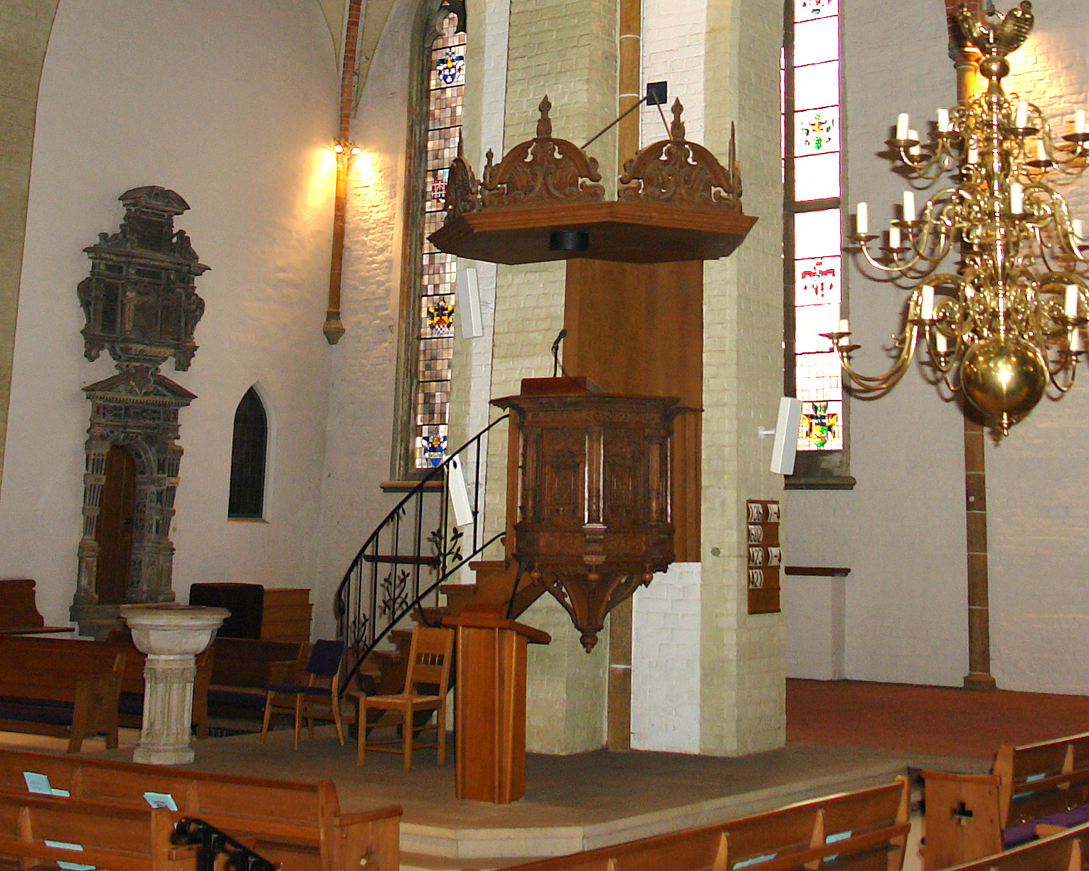 St.Martini-Kirche in Bremen. Die Kanzel (Ende 16.Jh.) aus der Werkstatt des Bremer Holzschnitzers Hermen Wulff. Im Hintergrund das Portal zum Neanderhaus mit dem Zobel-Epitaph, rechts ein Leuchter (um 1650)